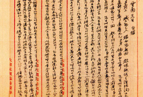 1928년 ko:11월 20일 상하이의 김구가 미국의 이승만에게 보낸 편지서신